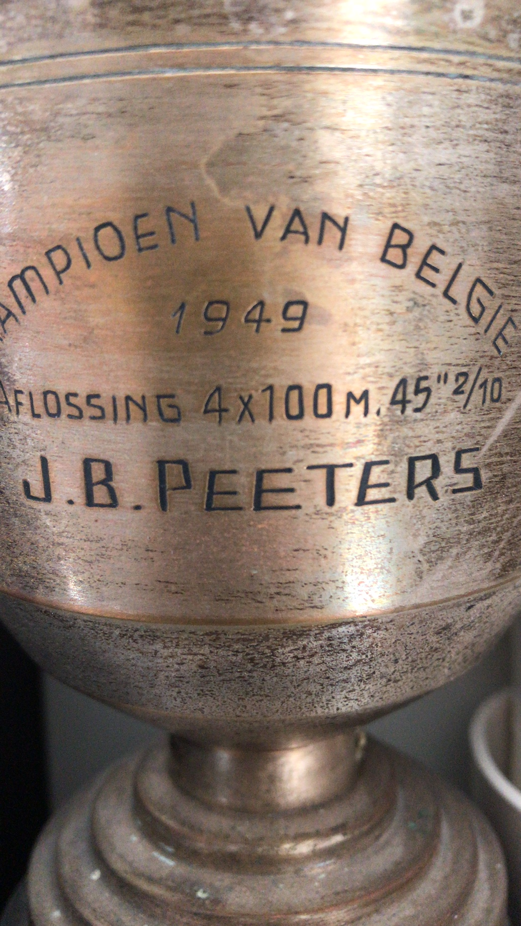 Fragment van de beker Belgisch kampioen 1949 aflossing 4x100m